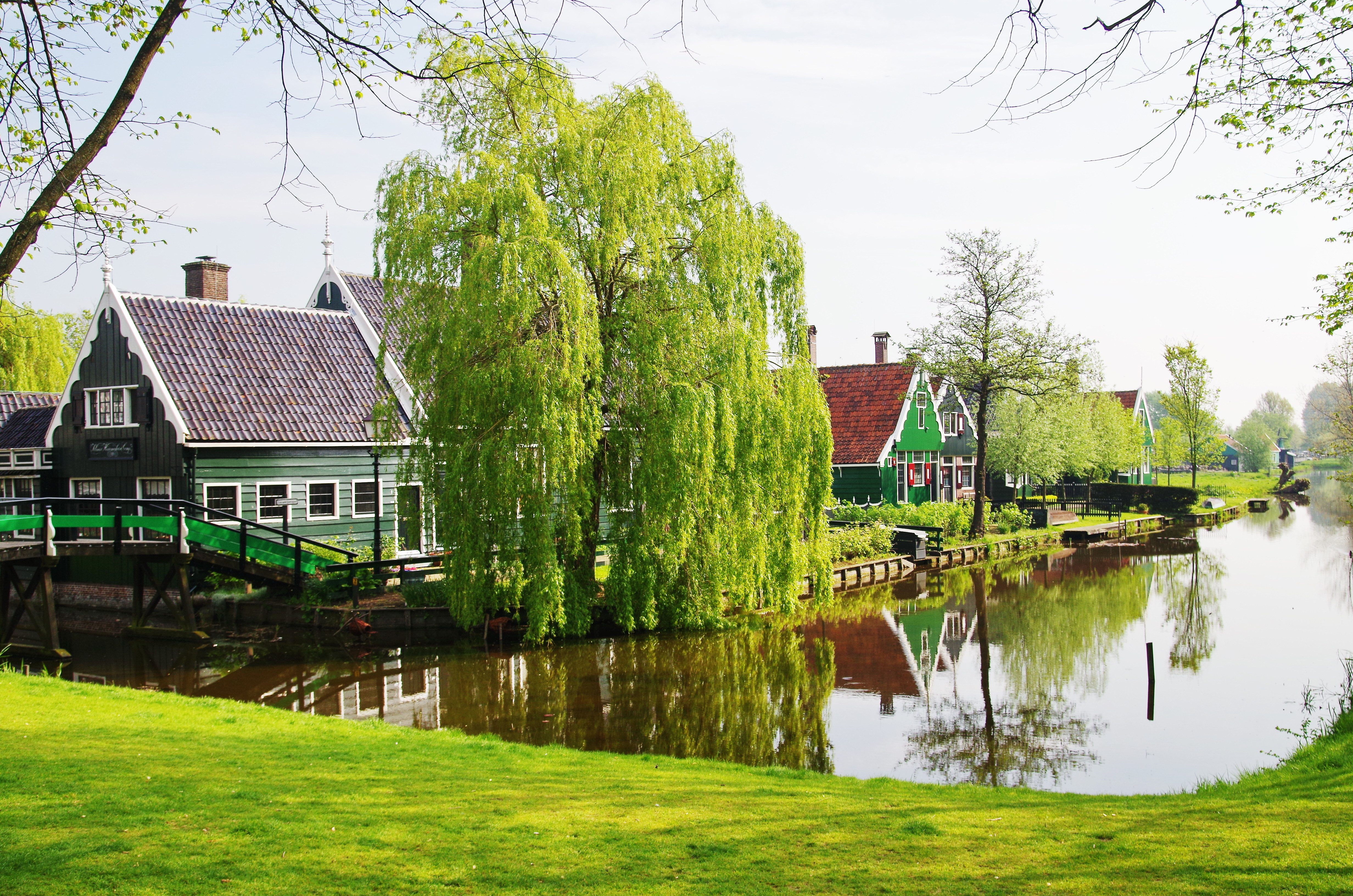 Wohnhäuser beim Museumsdorf Zaanse Schans